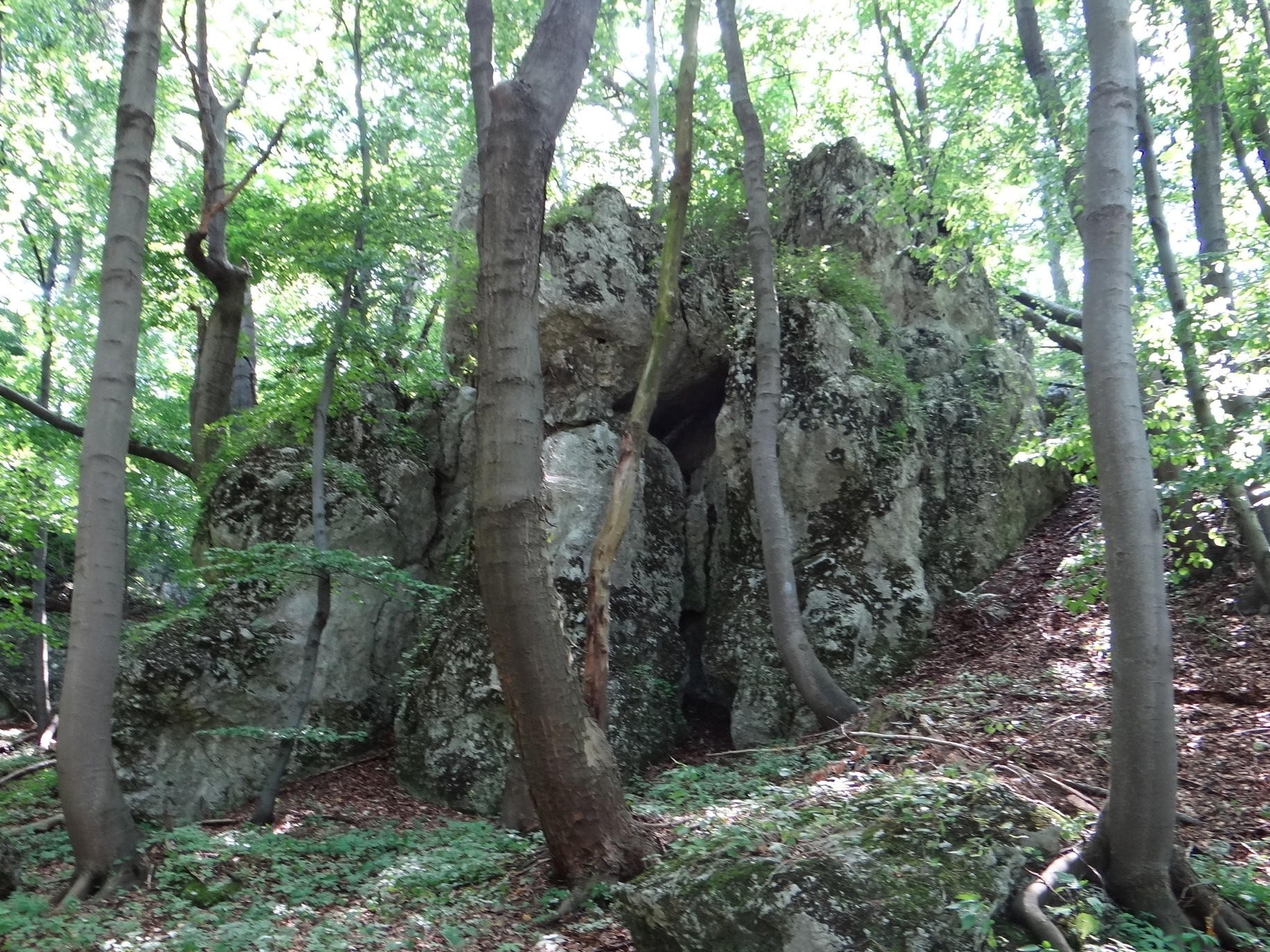 Skałki na szczycie wzgórza Parzenica nad Jaroszowcem